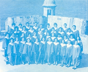 Coro de Bayamón en El Castillo del Morro, San Juan, PR. en el 1977.